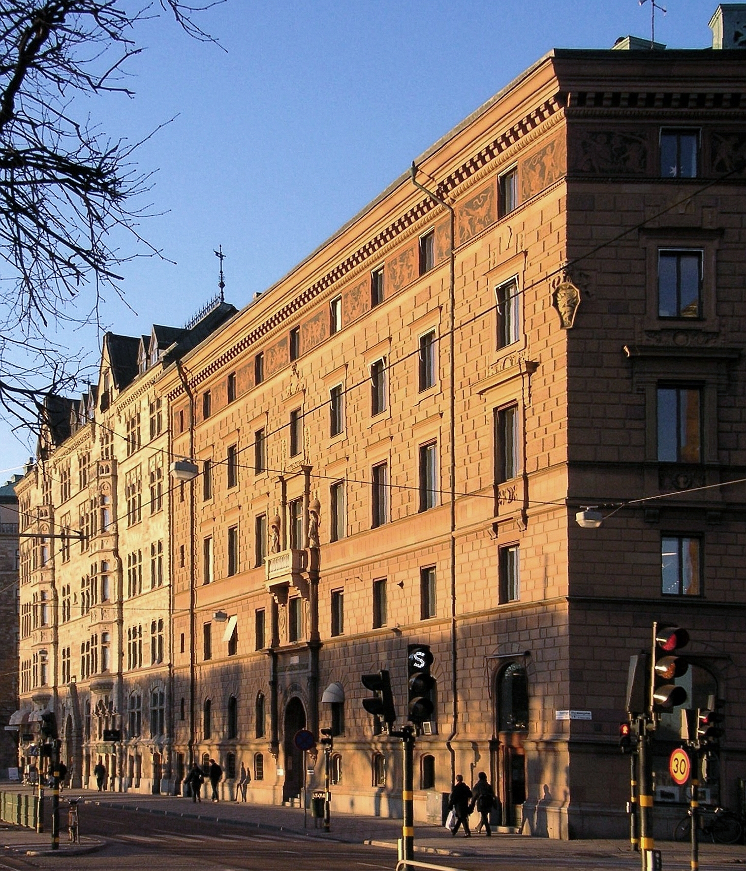 Hus "Strandvägen nr 19-21" i Stockholm, arkitekt Clason